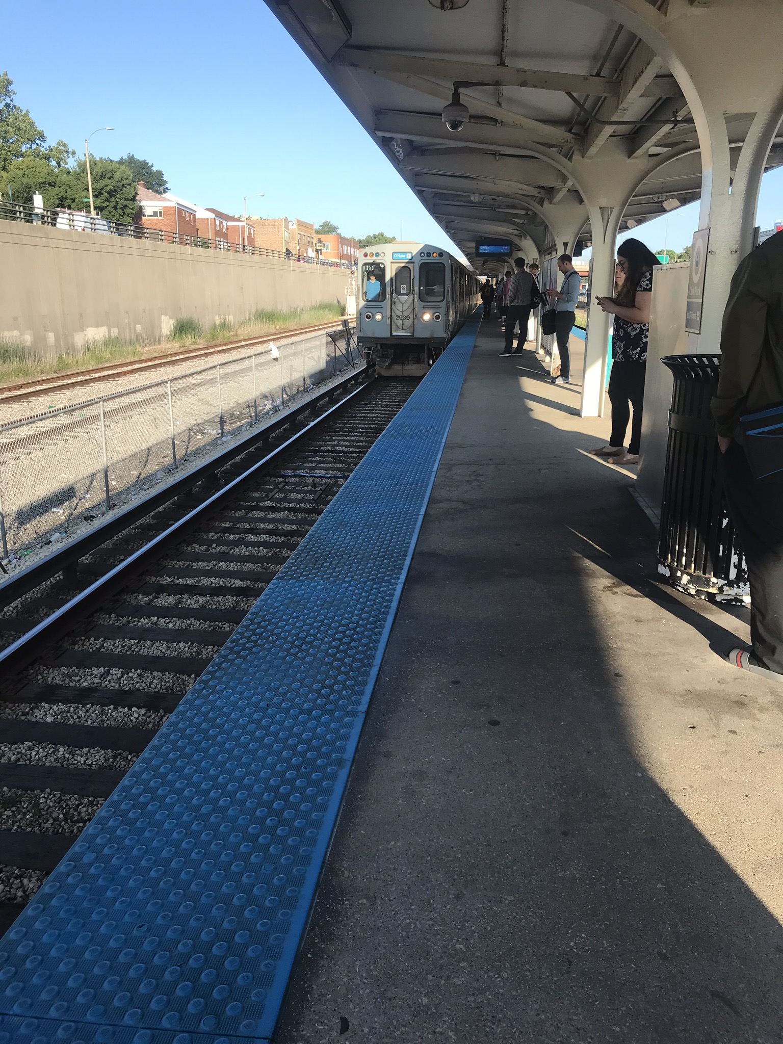 Metro CTA